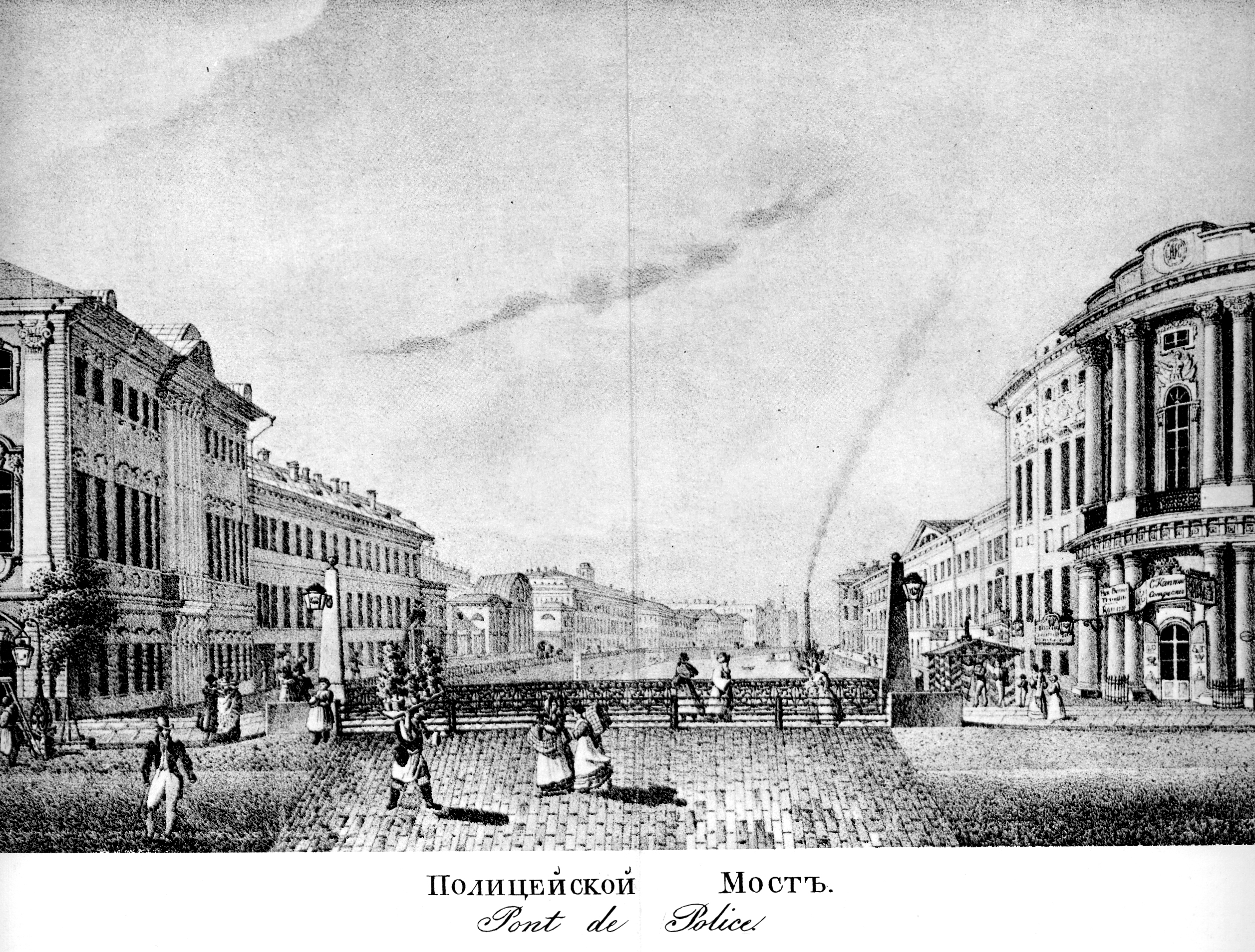 Полицейский мост в 1830-е, ныне - Зелёный мост. Тот вид, в котором его построил Вильям Гесте